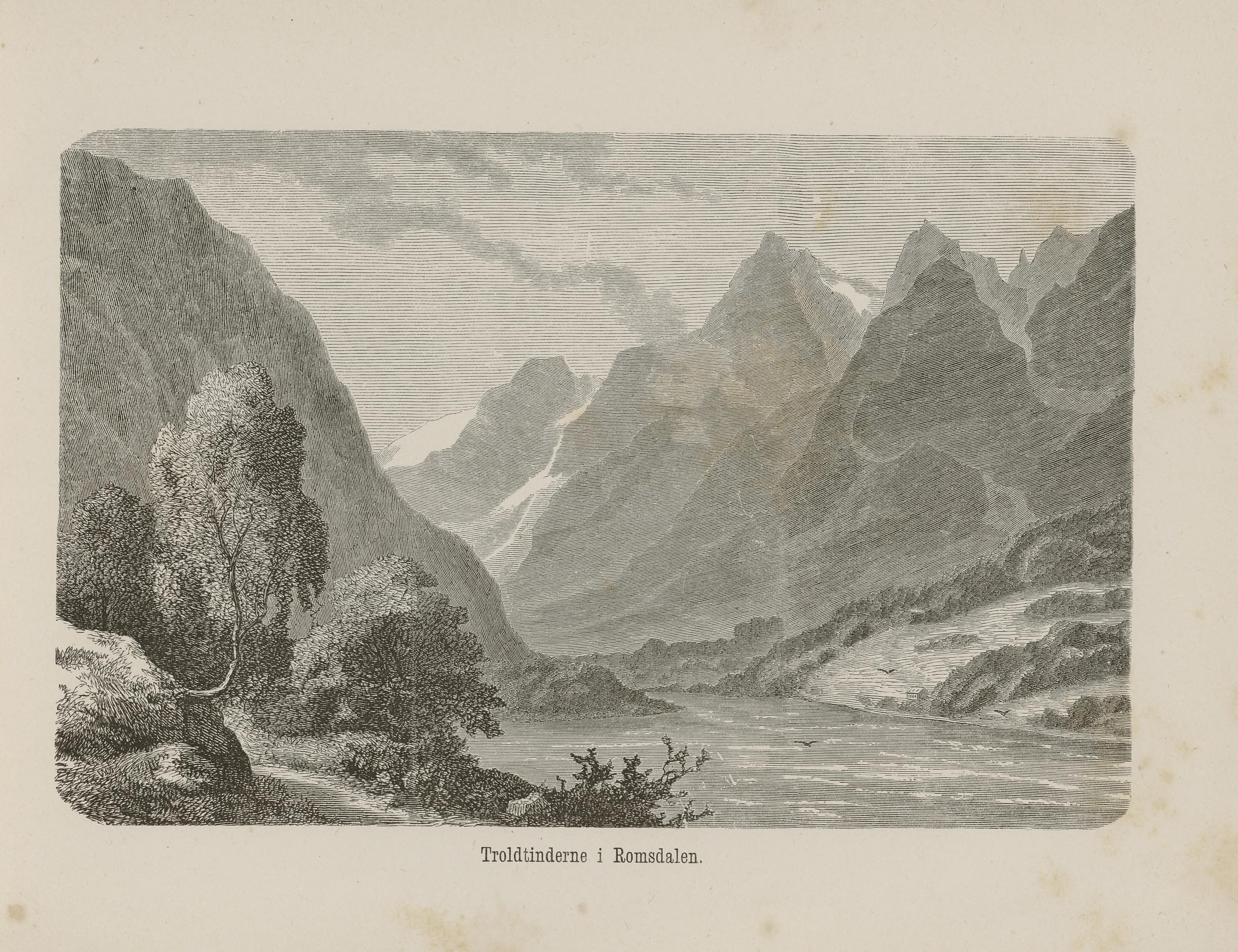 Illustrasjon hentet fra boken Nordiska taflor av ukjent forfatter og utgitt av Albert Bonnier (se, 1865)